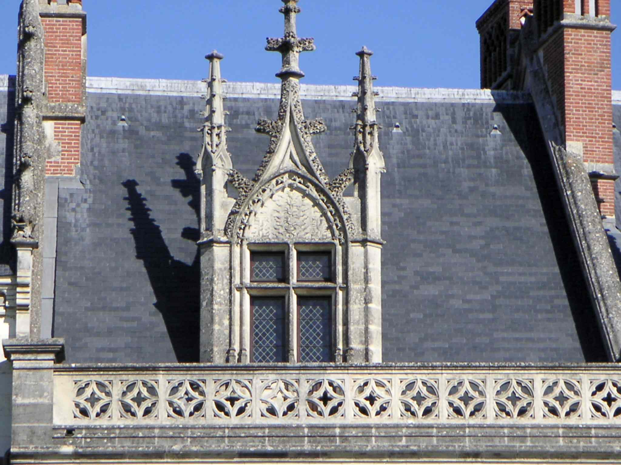 Lucarne gothique château d'Amboise. Auteur : LonganimE (19/sept/2005)